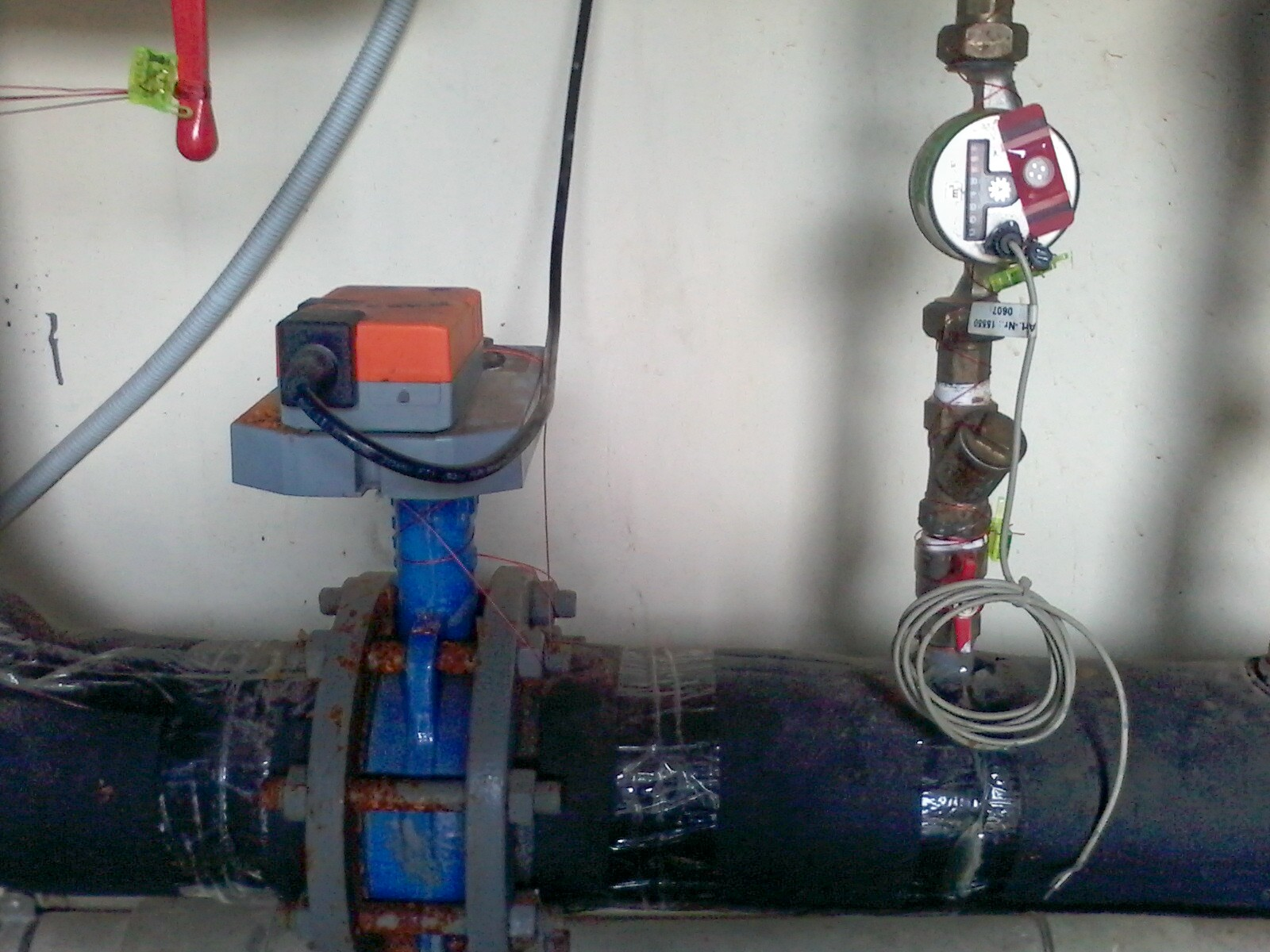 корозія